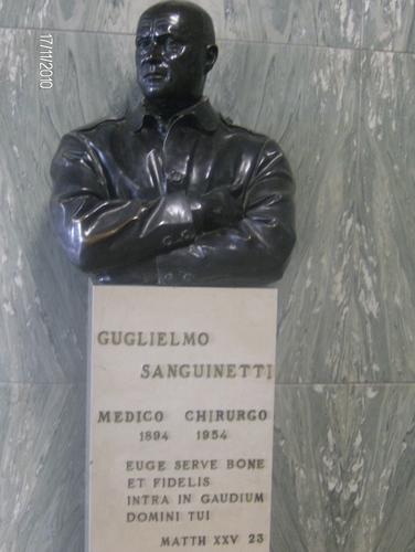 Busto Gugliemo Sanguinetti